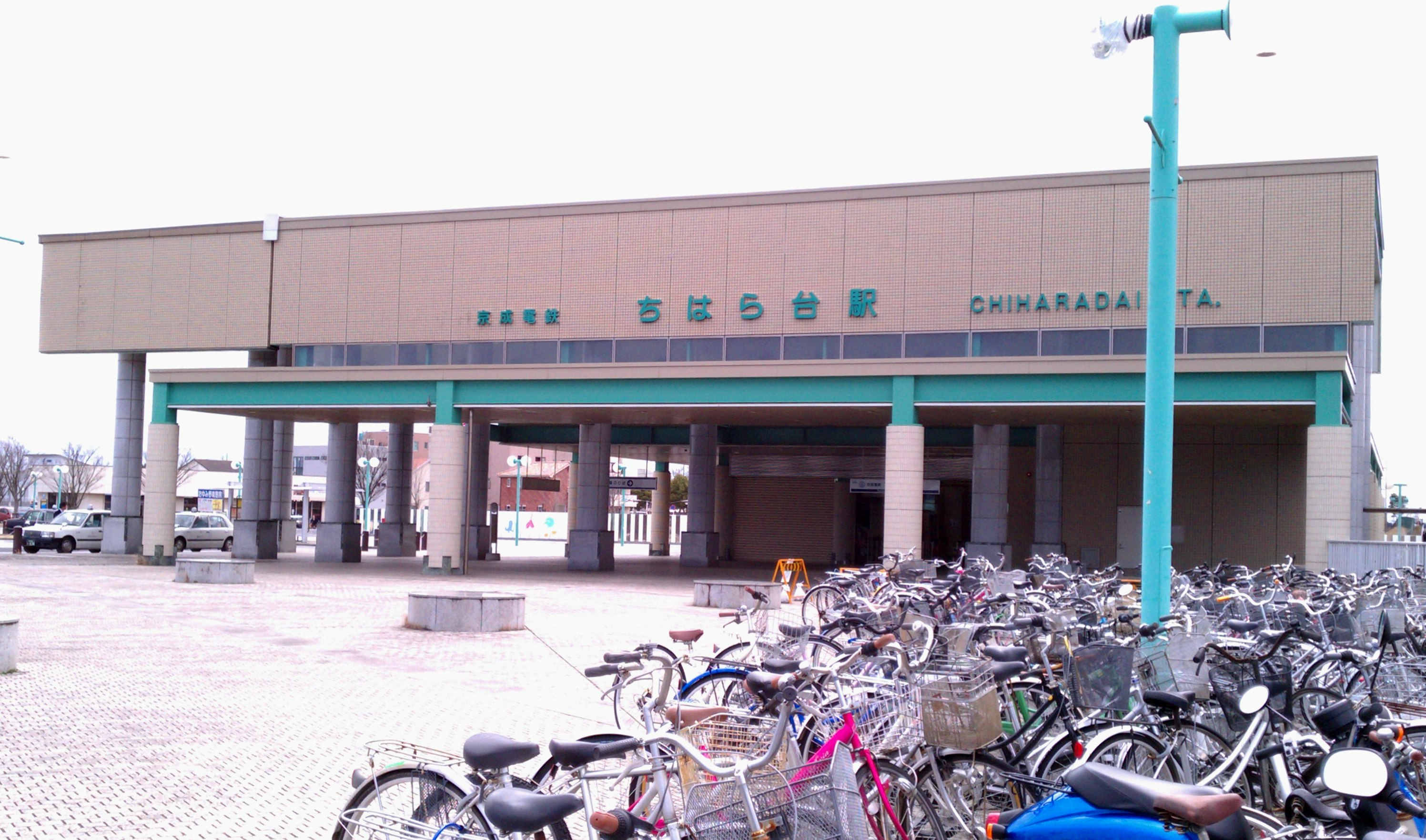 京成電鉄千原線 ちはら台駅 Unknown